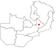 Lage von Serenje in Sambia